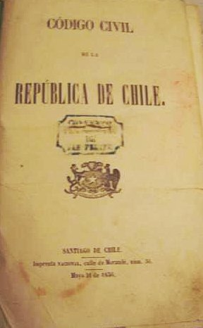 Primera página de la primera edición del Código Civil de Chile. Santiago de Chile: Imprenta Nacional, calle de Morandé, núm. 36. Mayo 31 de 1856.